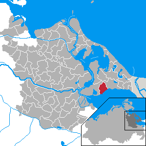 Stolpe auf Usedom, Landkreis Ostvorpommern, Mecklenburg-Vorpommern